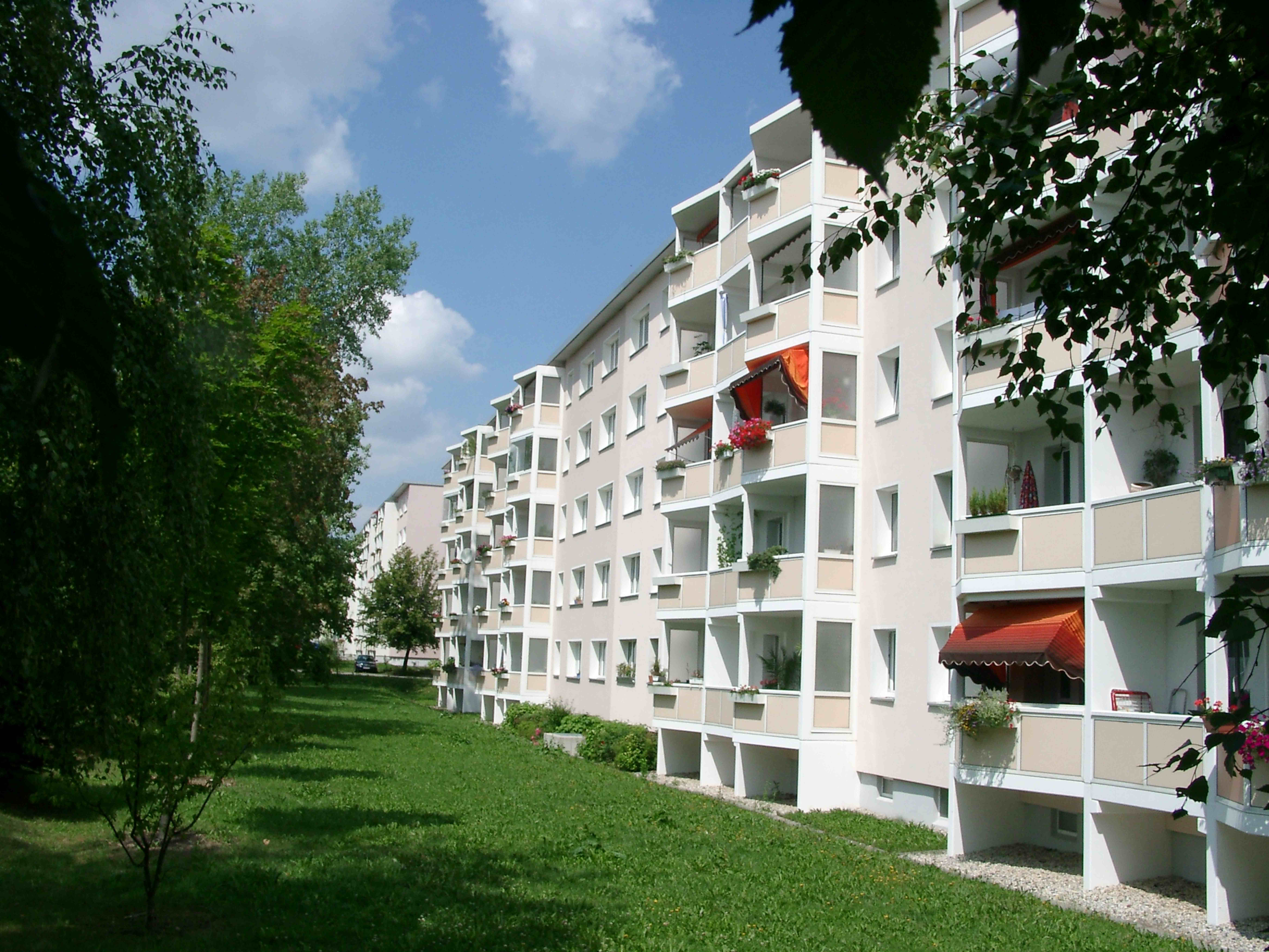 Saniertes Wohngebäude in industrieller Bauweise in Freiberg / Sachsen